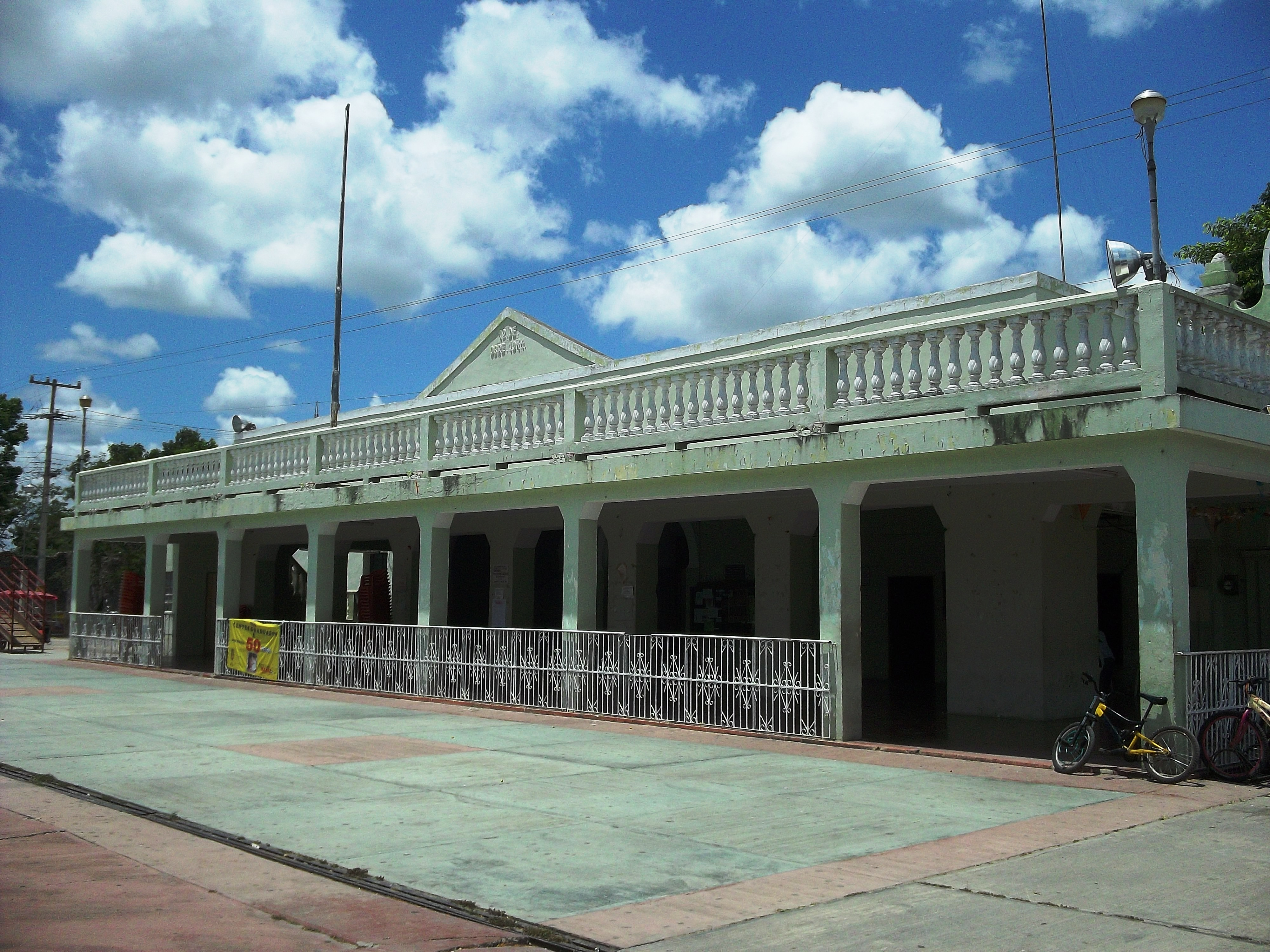 Palacio municpal de Muxupip, Yucatán.